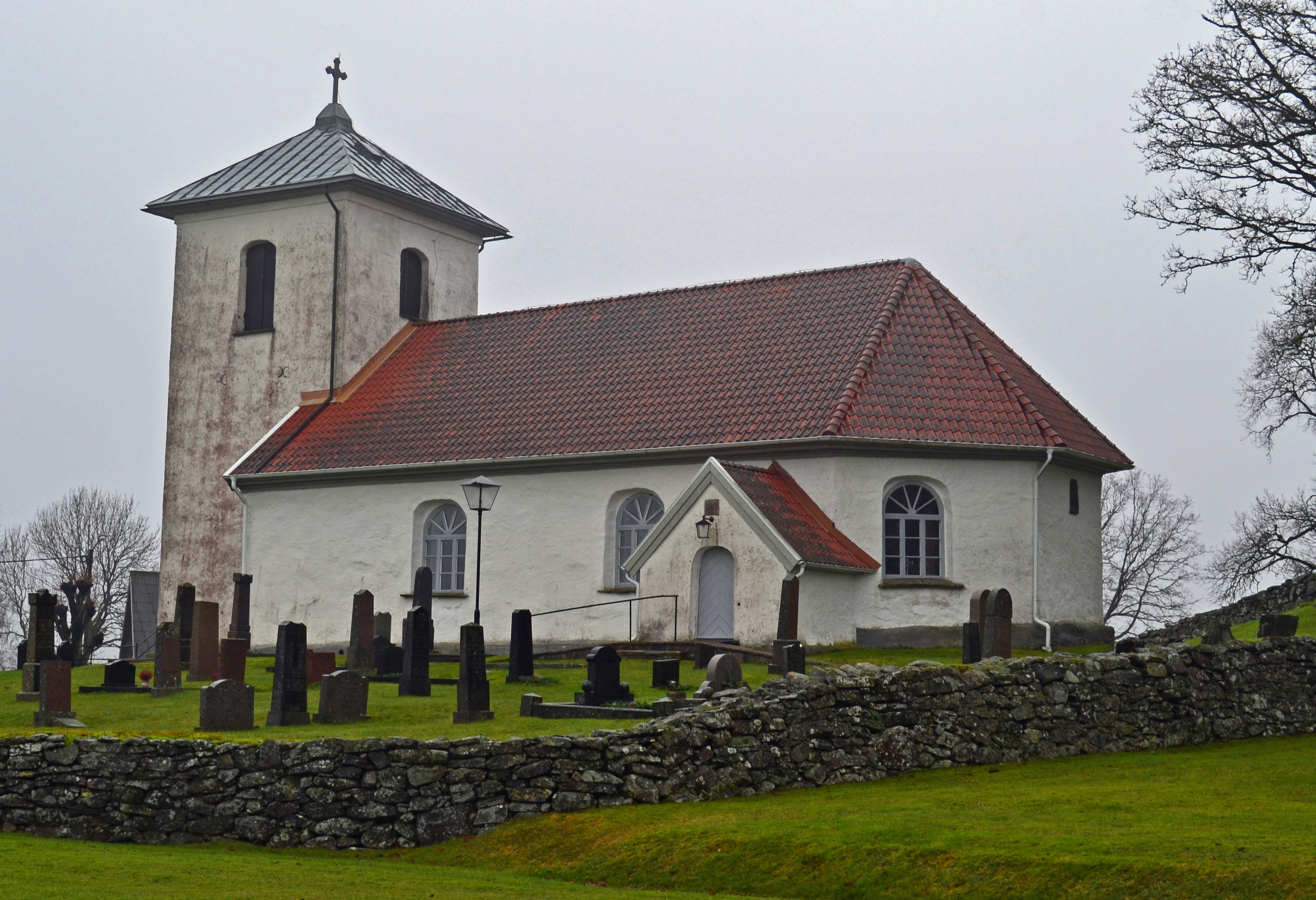 Kyrkan i Gunnarsjö.